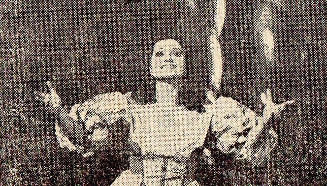 Ewa Werka, jako Benigna w Czarnej Masce. Poznań, T. Wielki. 25.10.1987r.